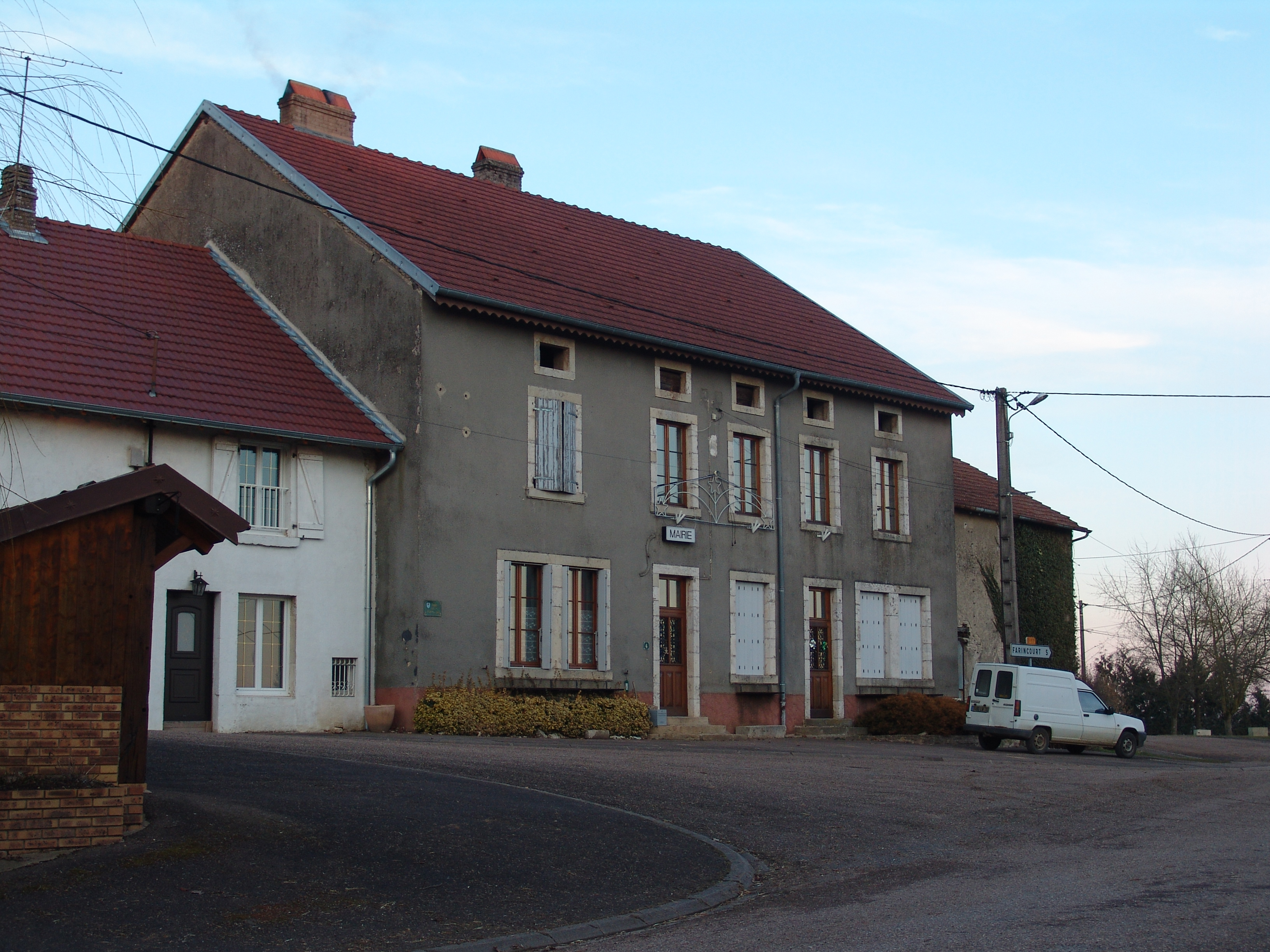 Gemeentehuis